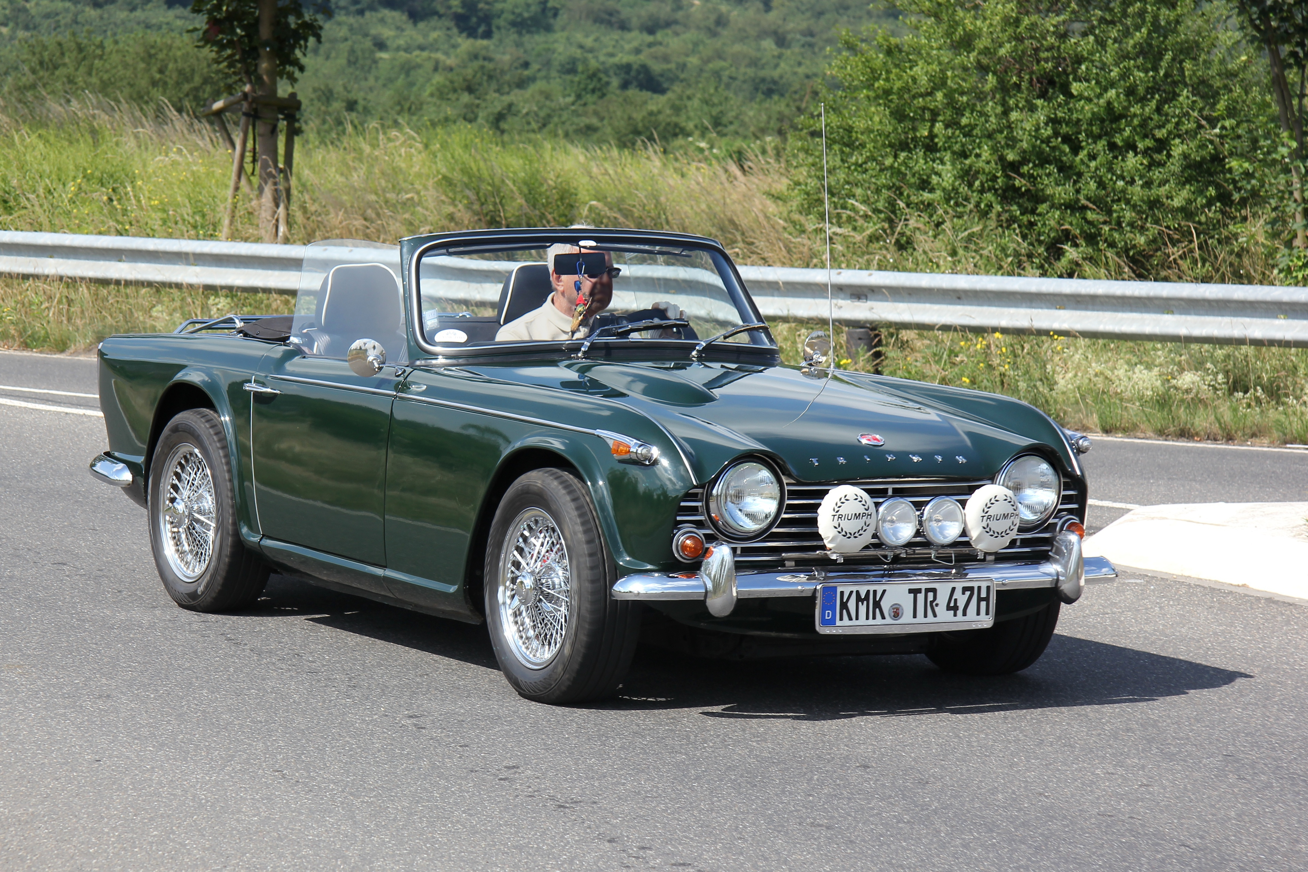 Triumph TR 4A, gebaut von 1965 bis 1967; Kennzeichen verändert